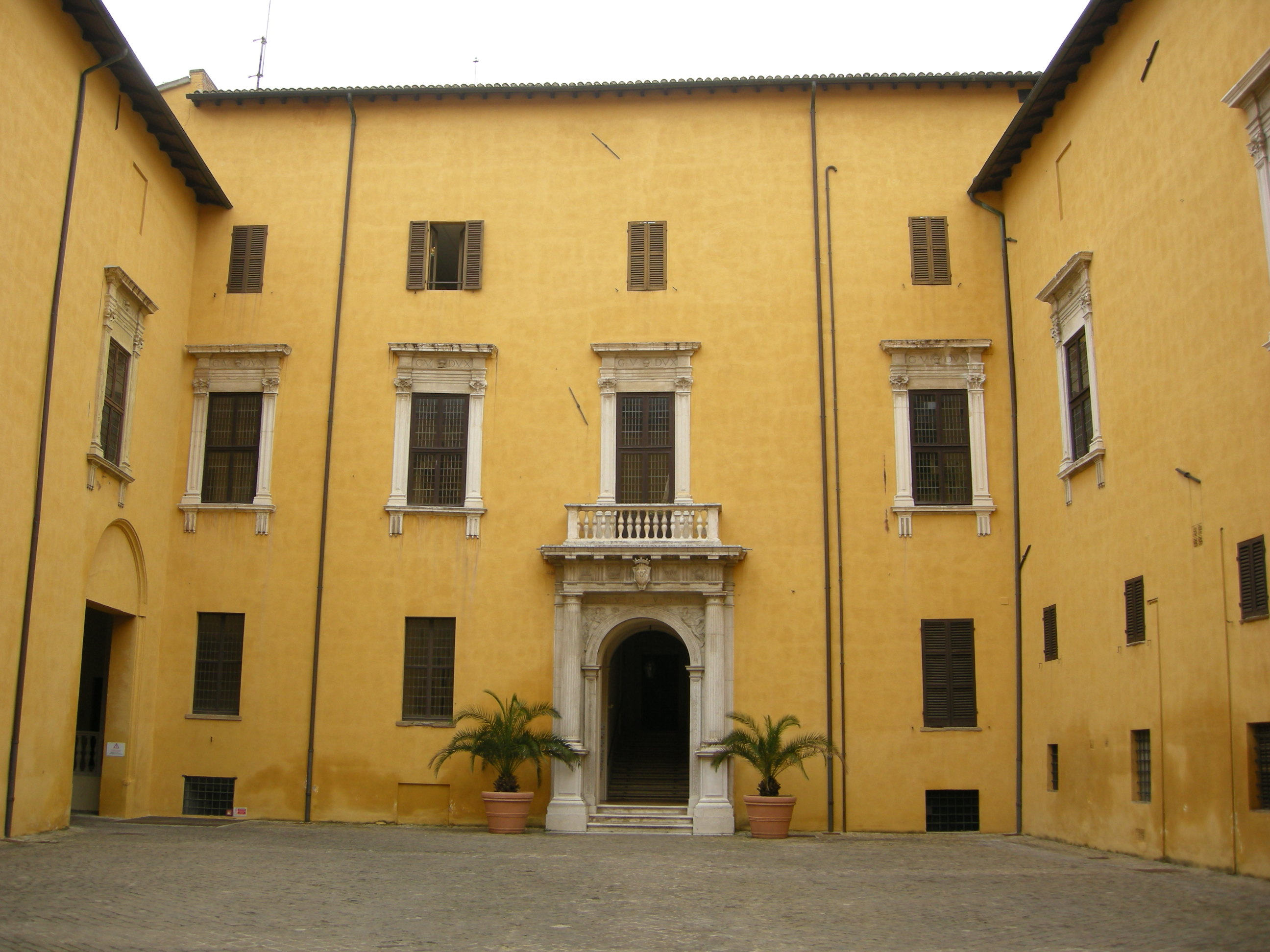 Girolamo e Bartolomeo Genga con Filiippo Terzi, ampliamento della “corte d’onore” del Palazzo Ducale a Pesaro